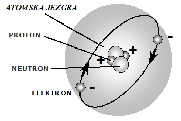 Bohr-ov model atoma